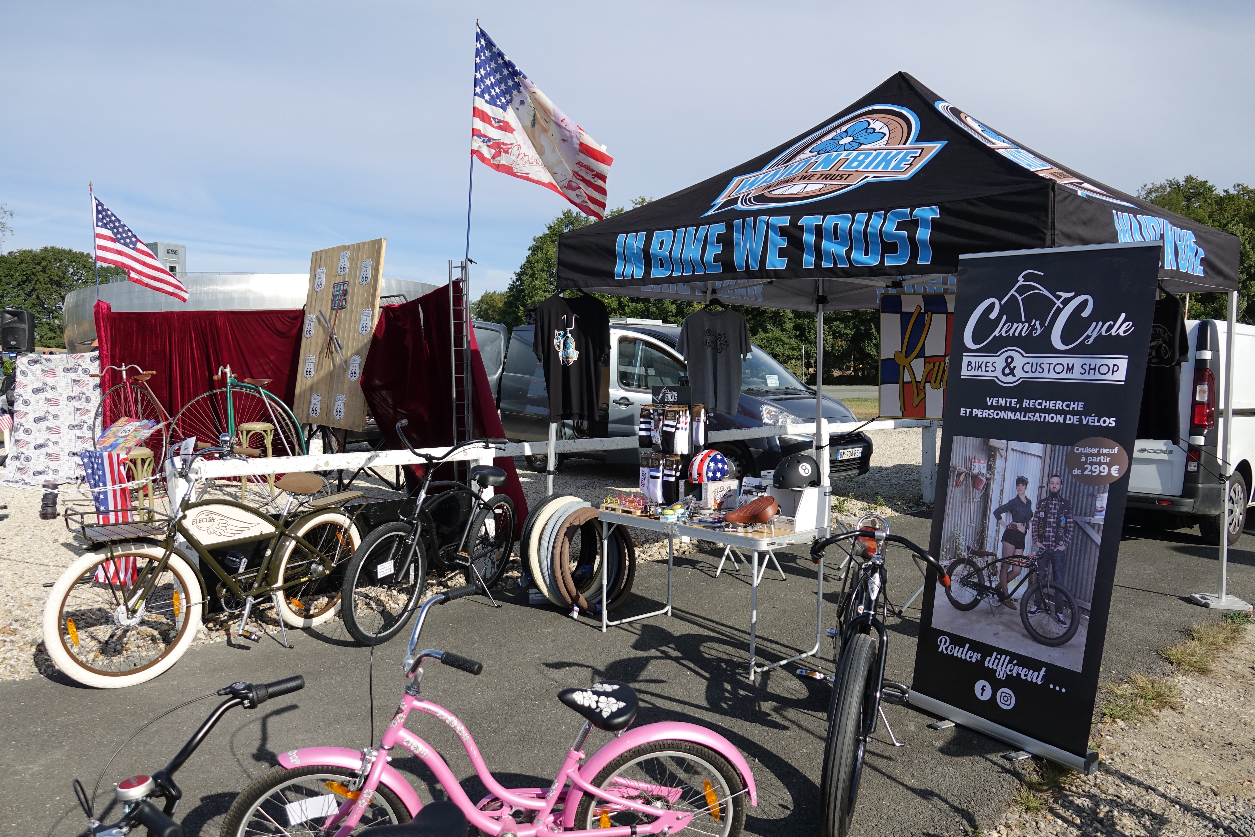 Autodrome Montlhéry - US Motor Show 2018